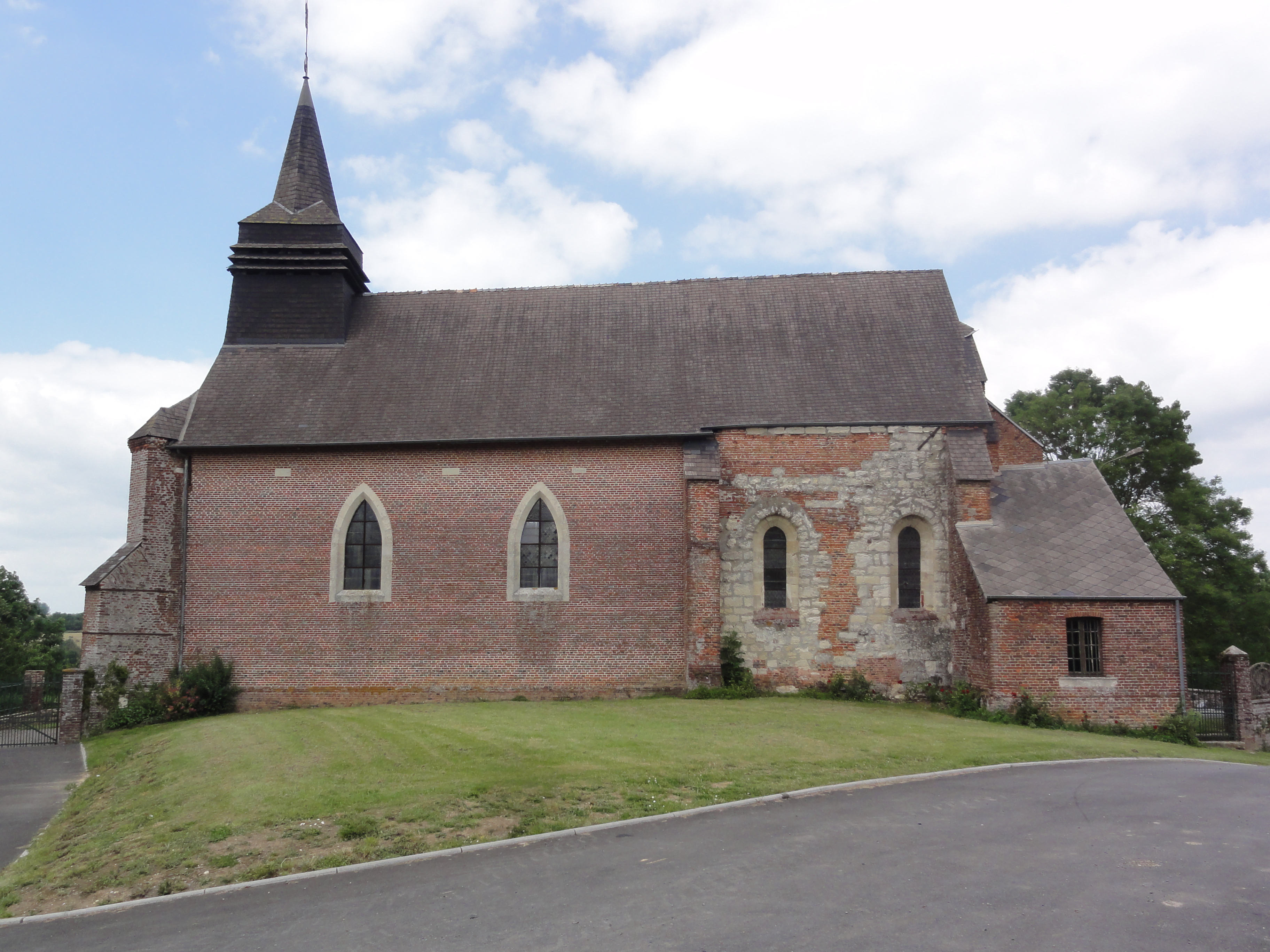 Saint-Clément (Aisne) église, latéral